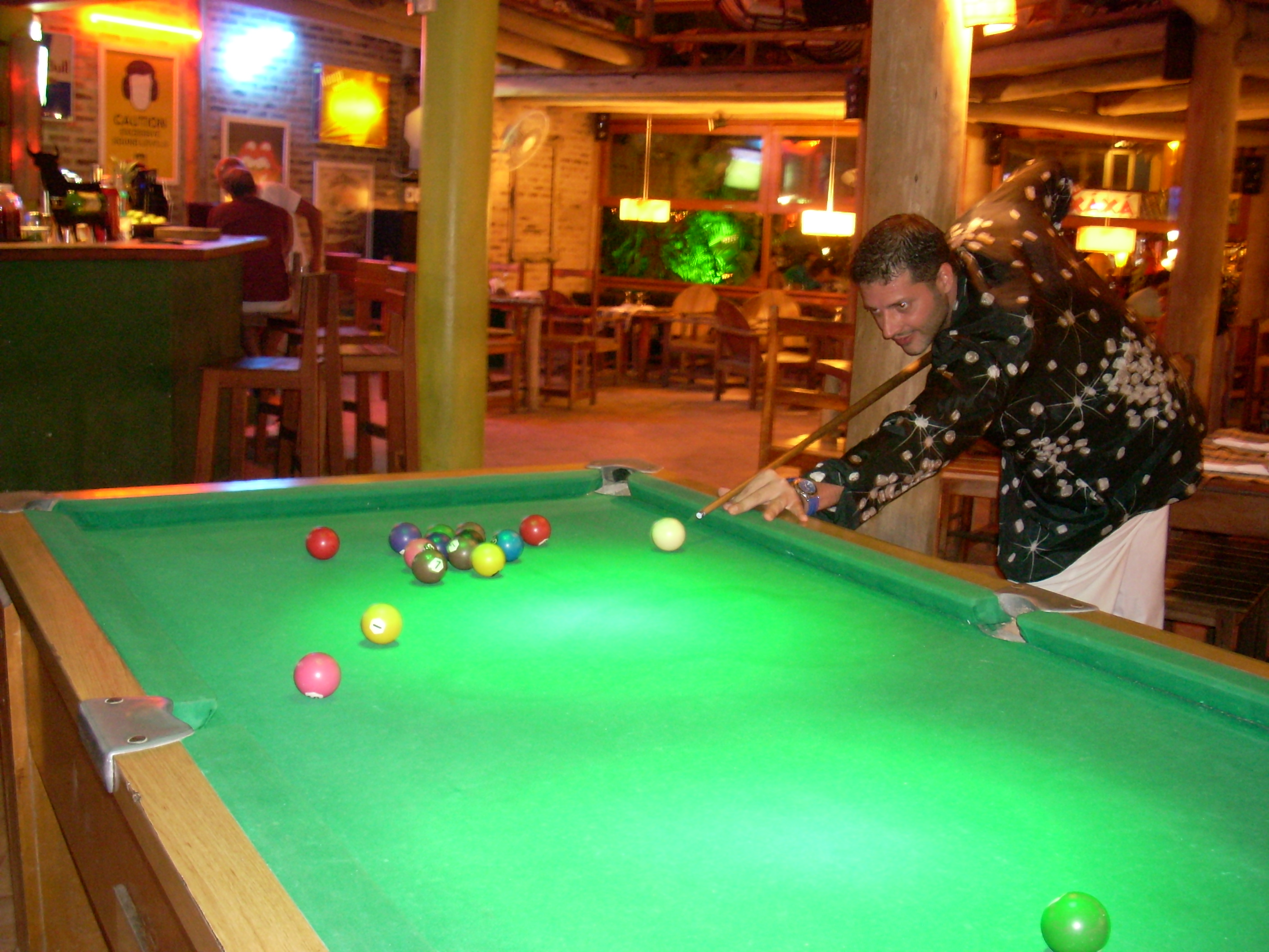 Arraial D´Ajuda Girasol, Brazil